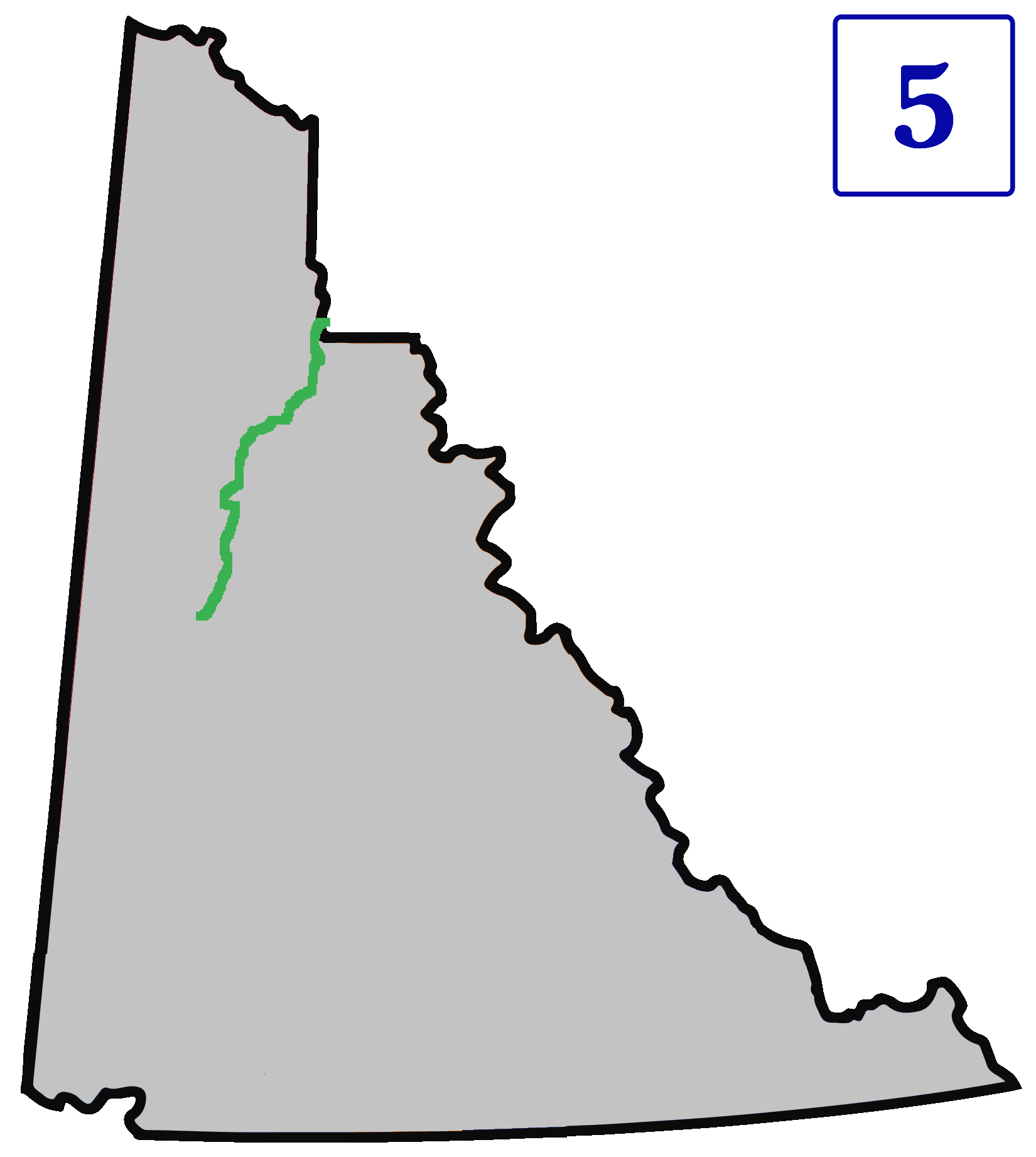 Carte de la route en Yukon